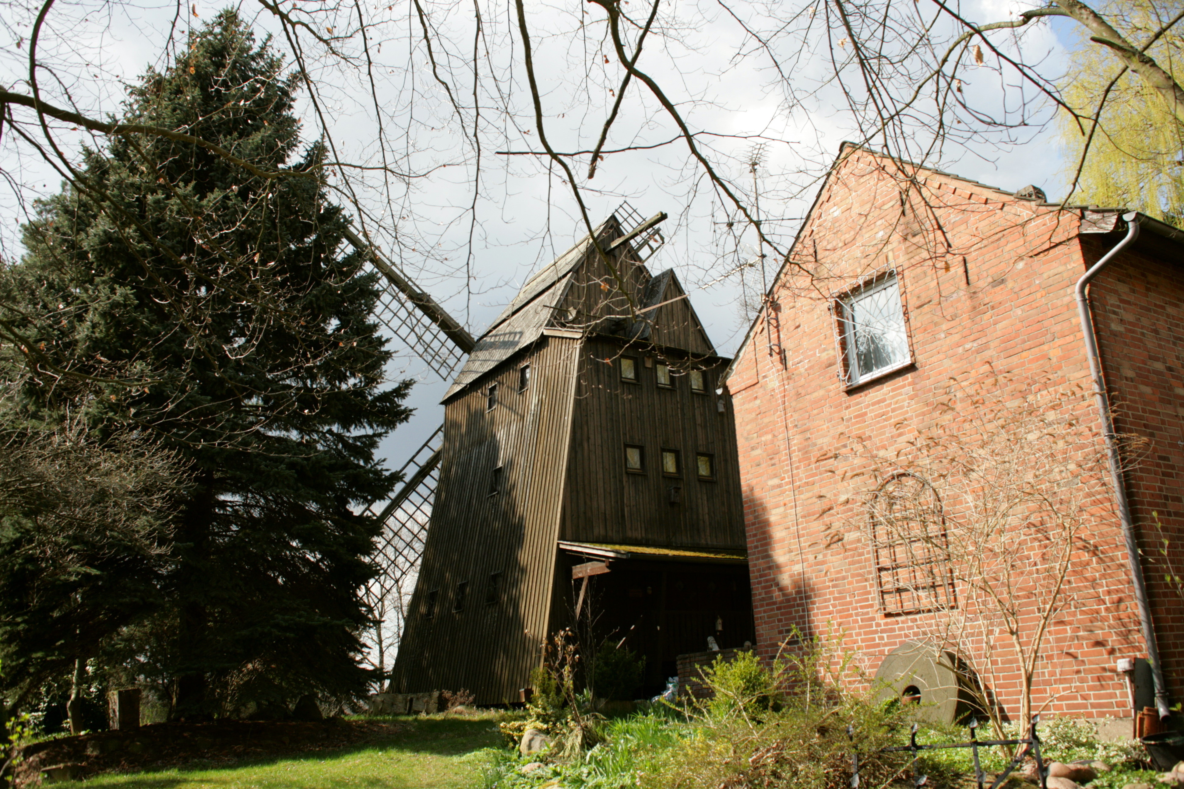 Windmühle Quickborn, Am Mühlenberg in Gusborn-Quickborn